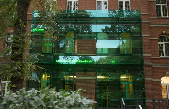 Feng-Shui Glaswand am Haupteingang des Alexianer St. Joseph-Krankenhauses Berlin-Weißensee